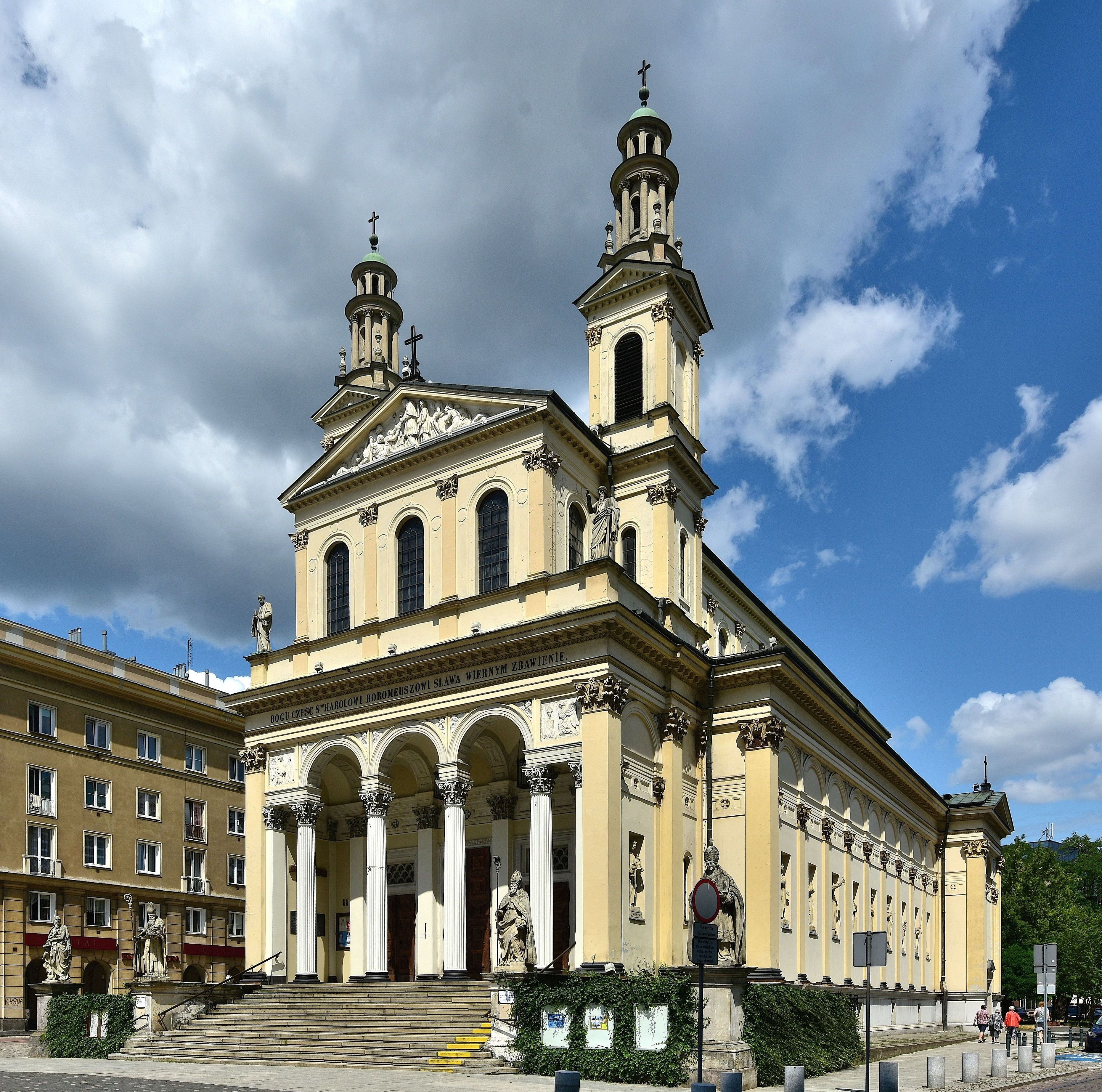 Kościół św. Karola Boromeusza w Warszawie